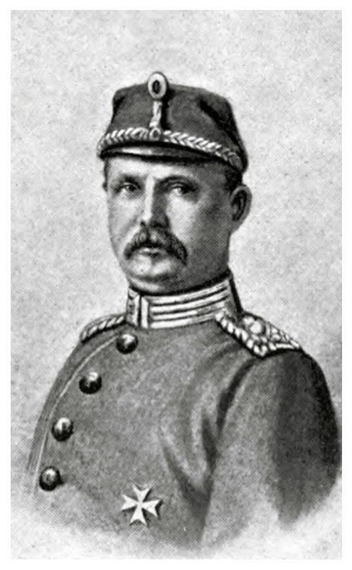 Oberst August Paul von Kahlden um 1866.